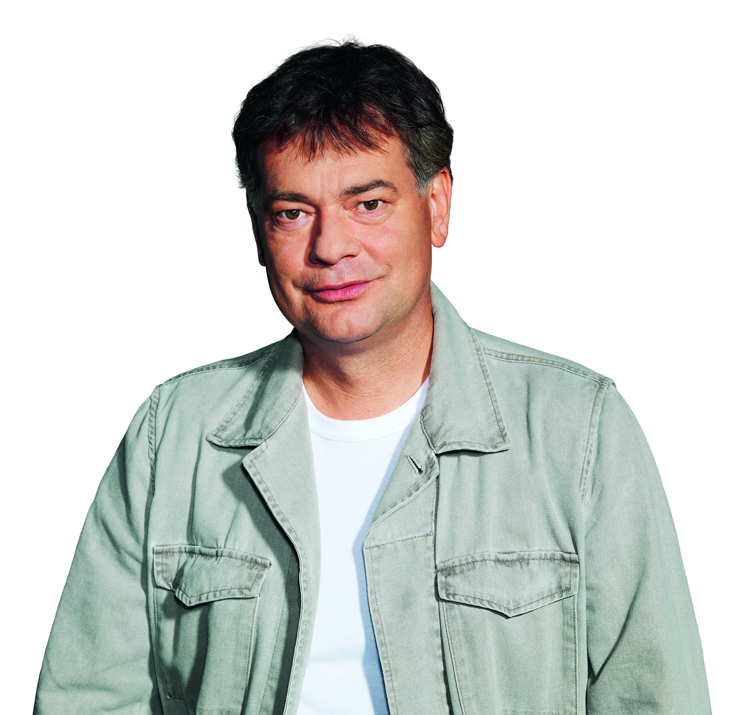 Werner Kogler, Spitzenkandidate der Grünen Steiermark bei der Landtagswahl 2010